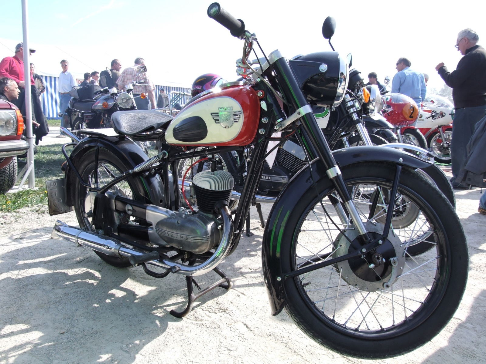 Quelle: selbst fotografiert, 04/2007 Fotograf: Späth Chr.